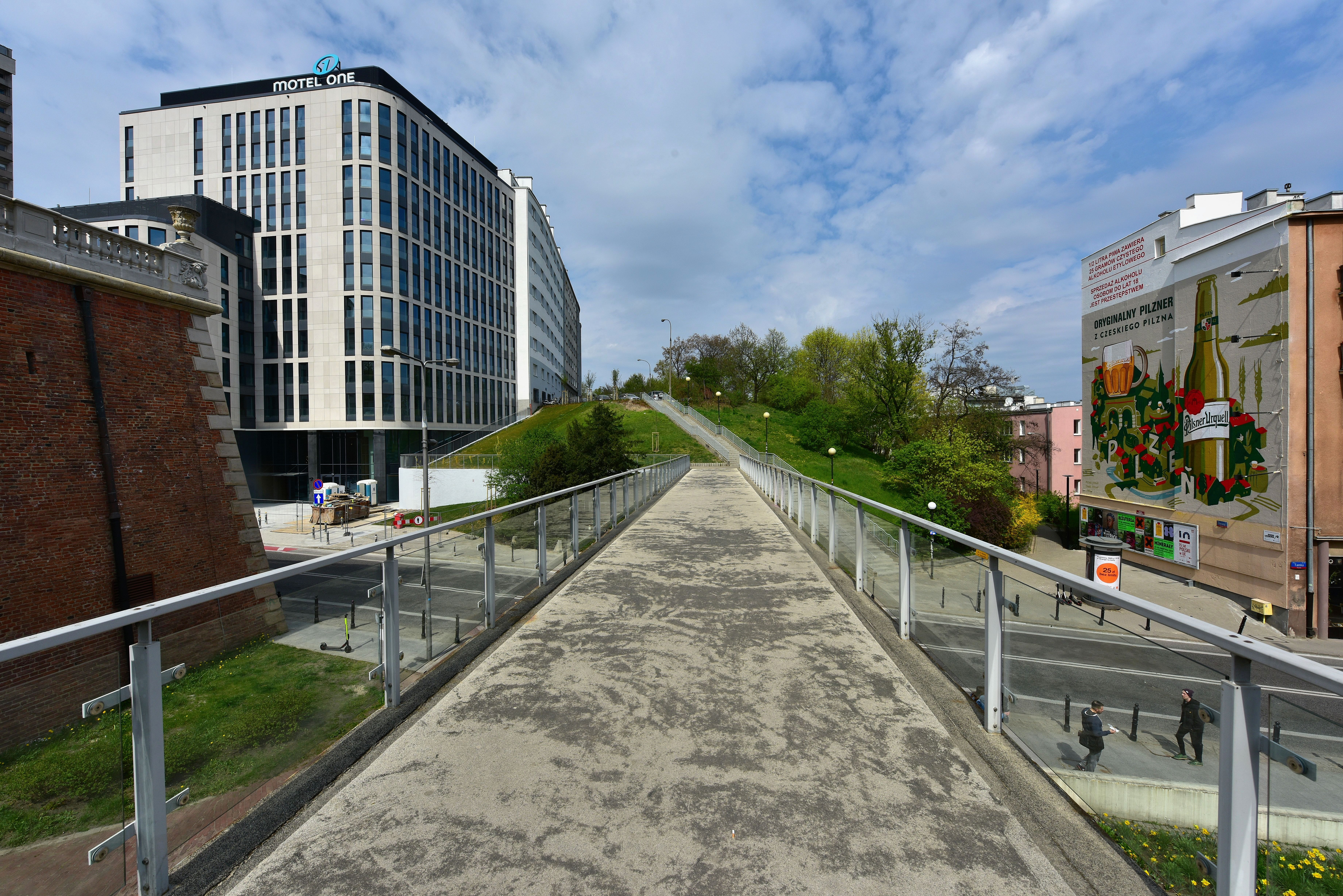 Kładka nad ulicą Tamka w Warszawie